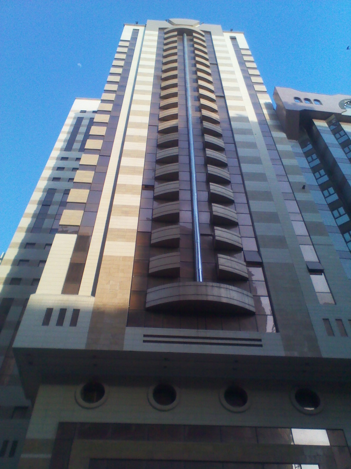 Ash Shubaikah, Mecca 24231, Saudi Arabia